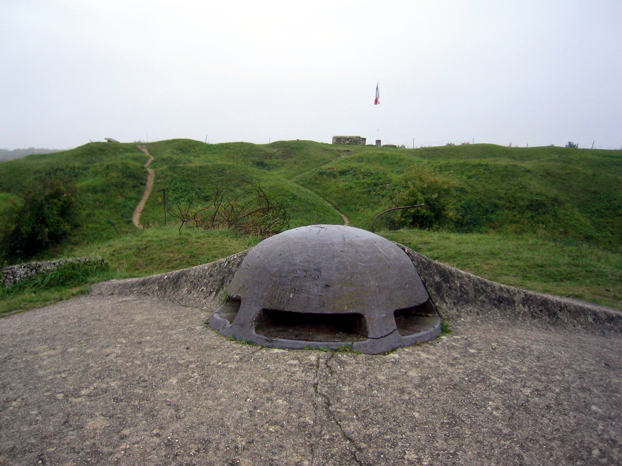 Fort de Vaux - Vue extérieure